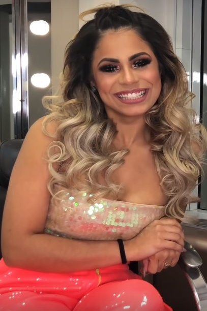 Lexa durante entrevista